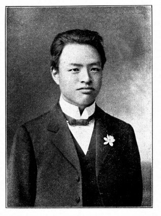 中華民國國會議員